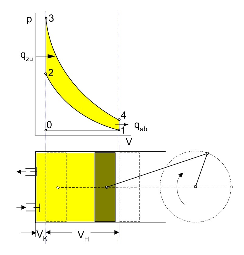 Otto-Prozess